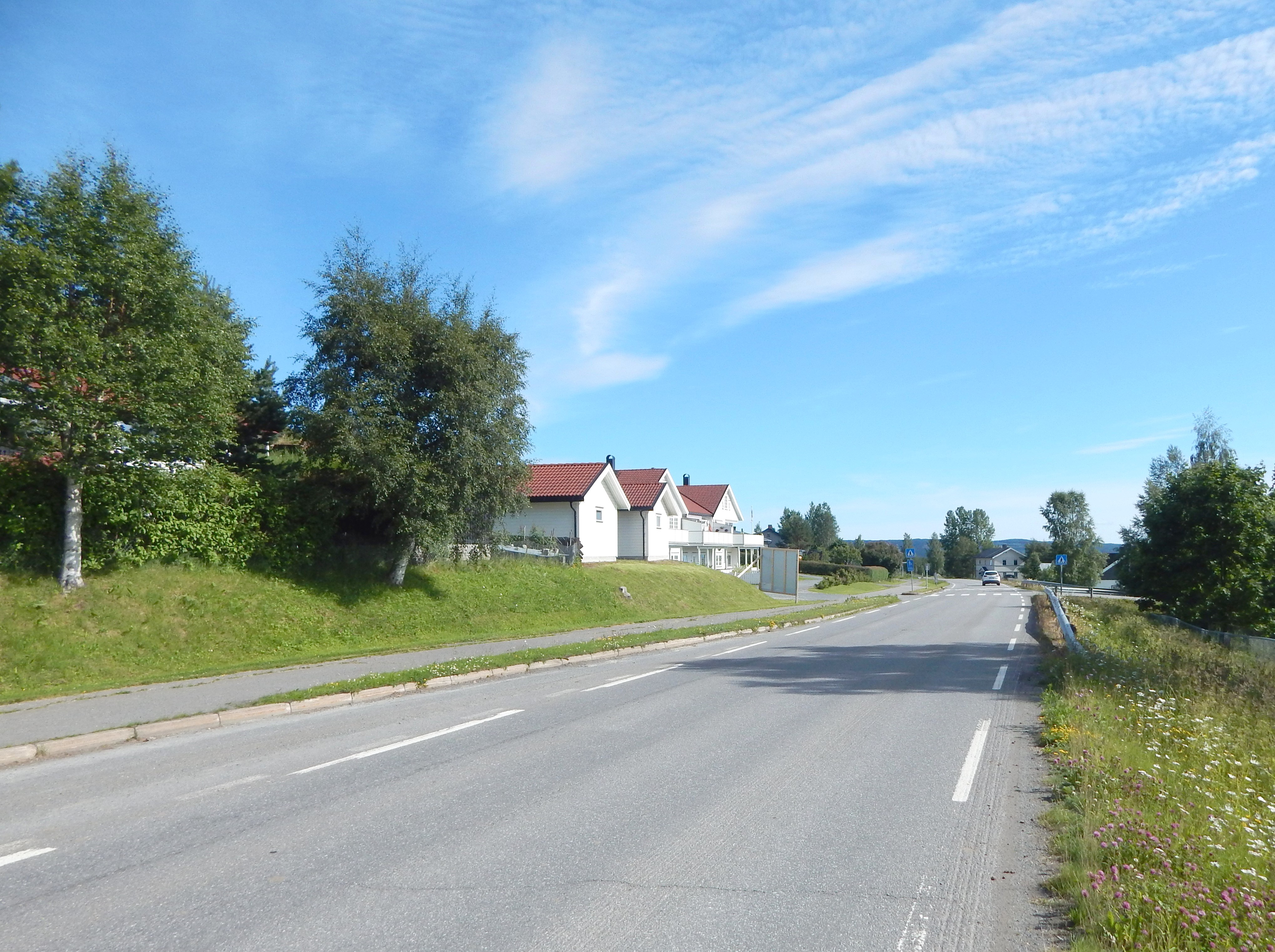 Fra Åsmarka